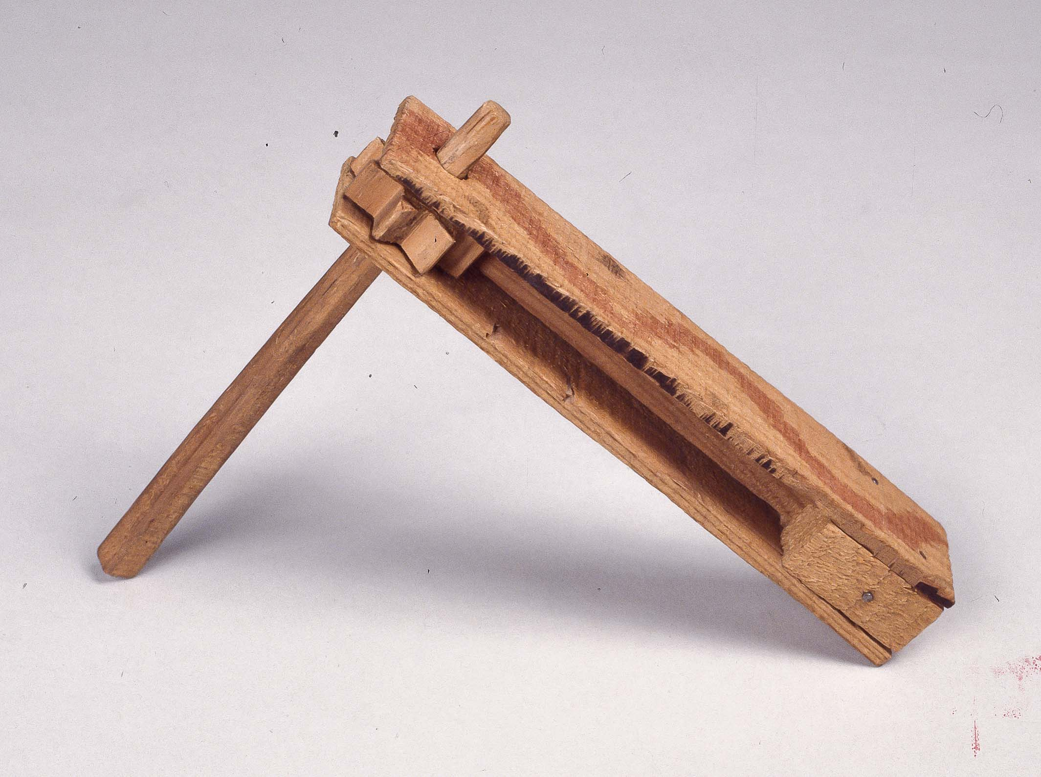 Xerrac, segle XX, MDMB 1075, fons del Museu de la Música de Barcelona